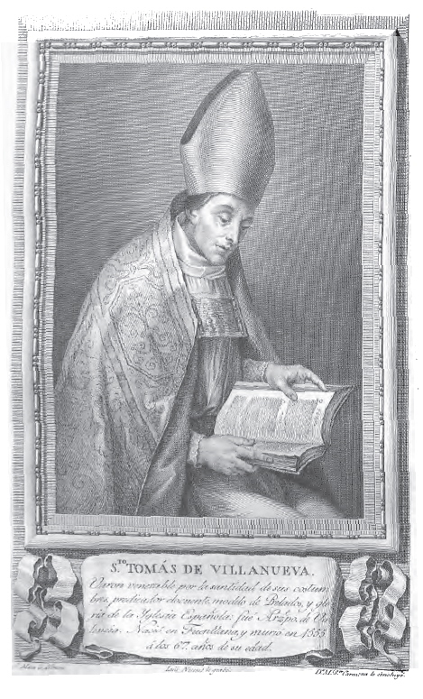 Retrato de Santo Tomás de Villanueva.